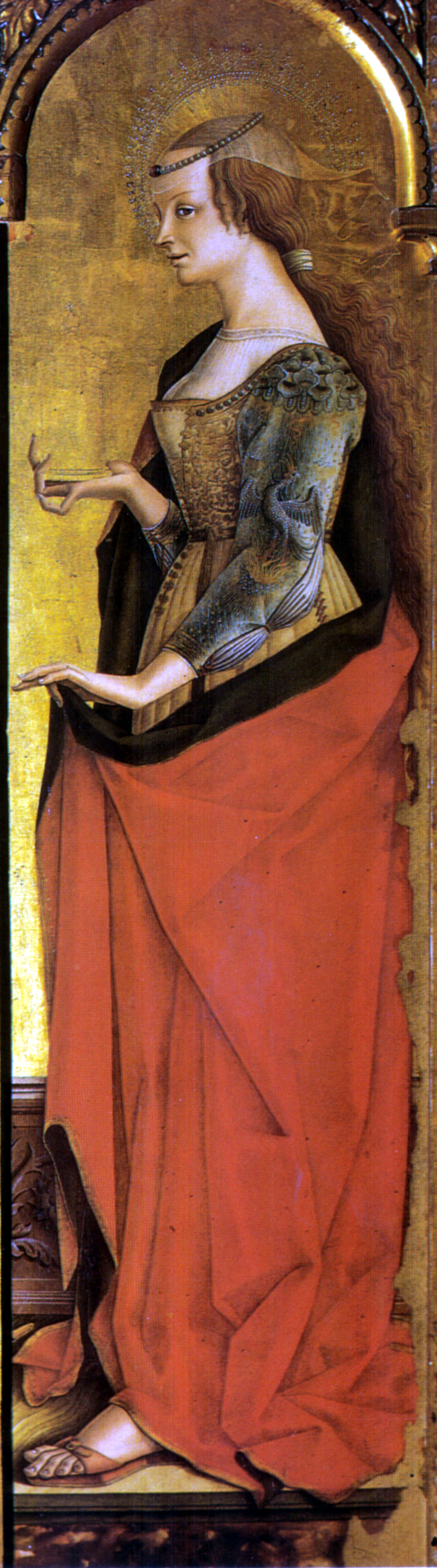 Carlo crivelli, montefiore, maddalena